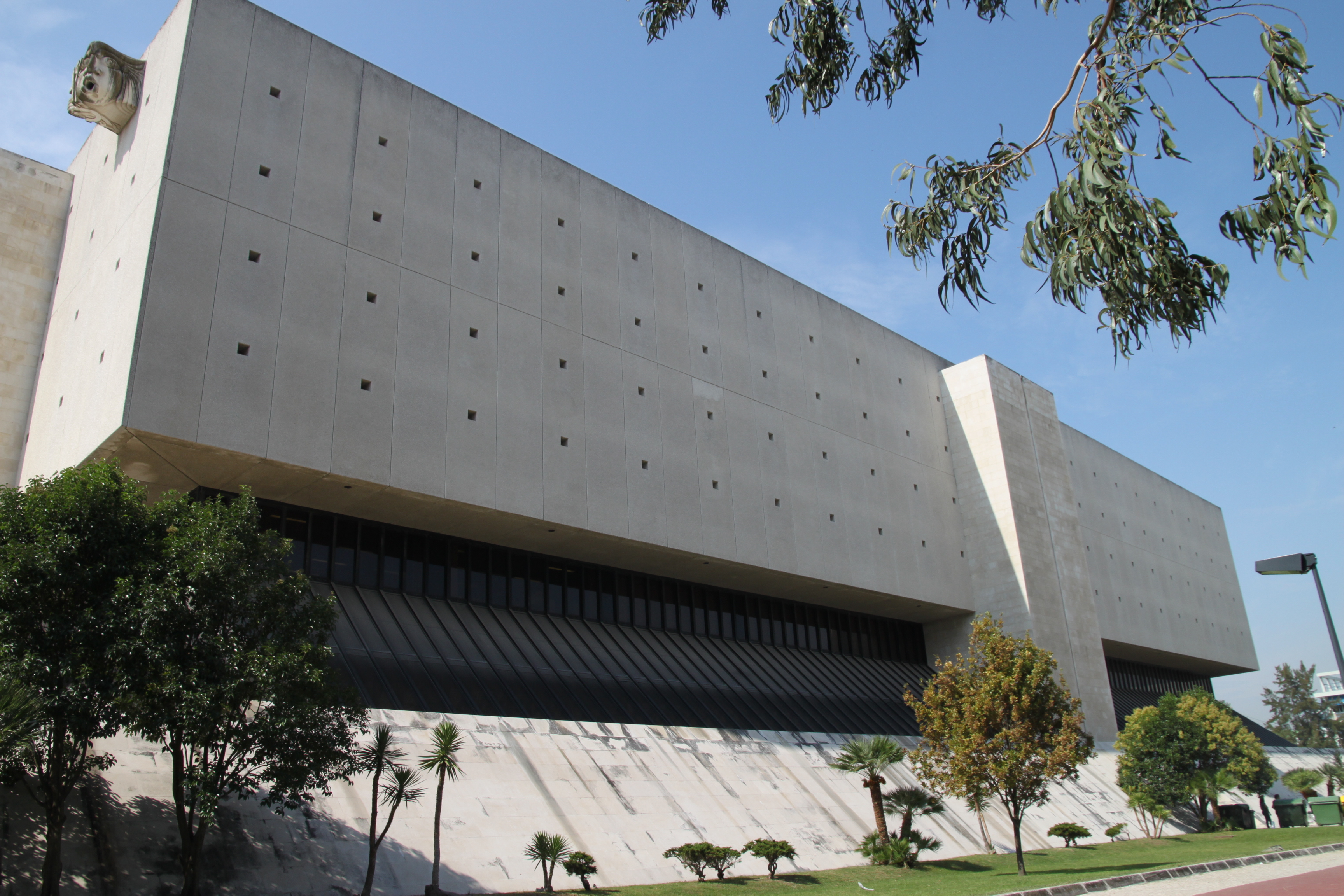 Torre do Tombo This file was uploaded for Wiki Loves Monuments in Portugal with the unique identifier 97014262.